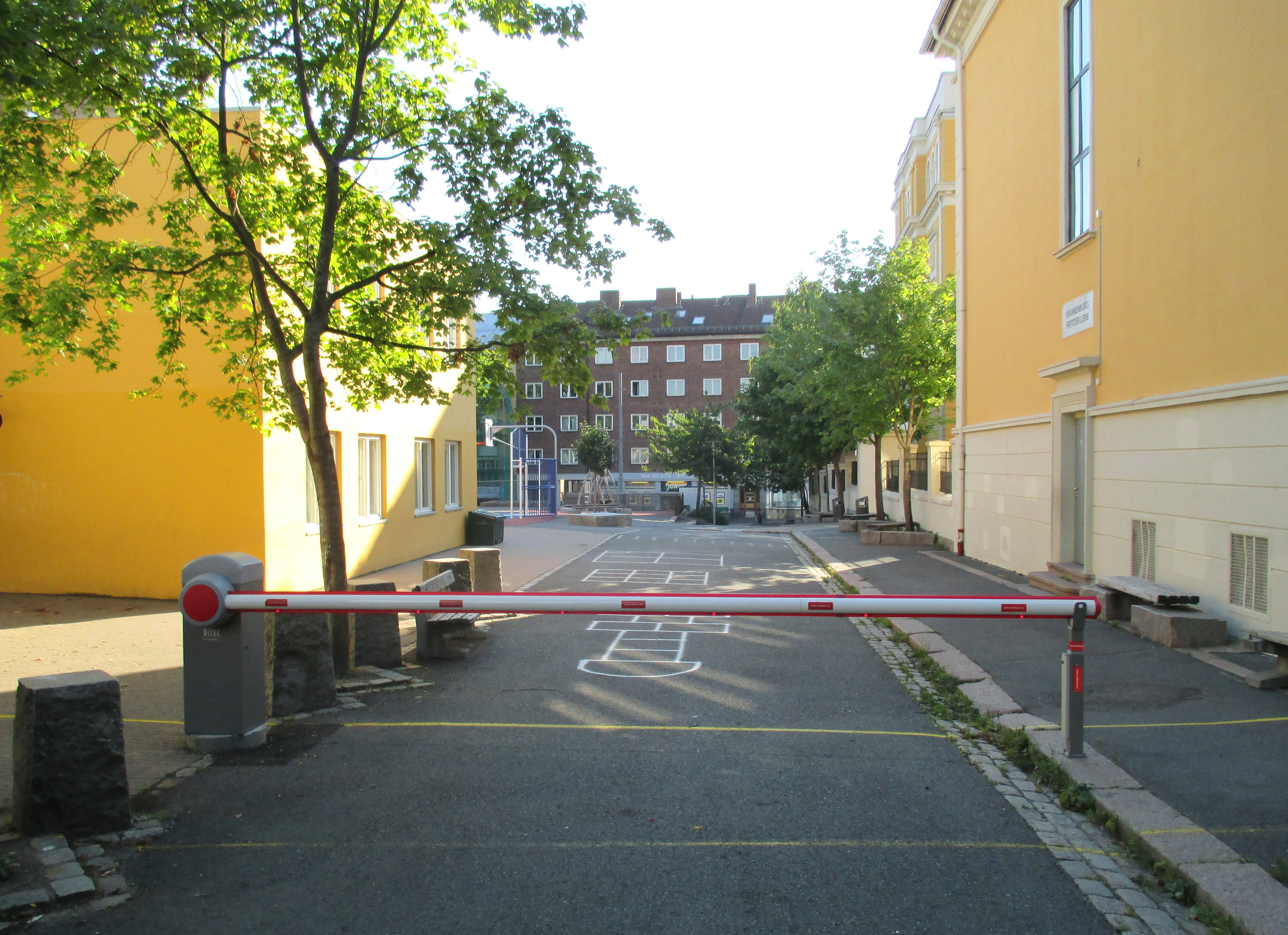 Harelabbveien nedenfor Uranienborg skole